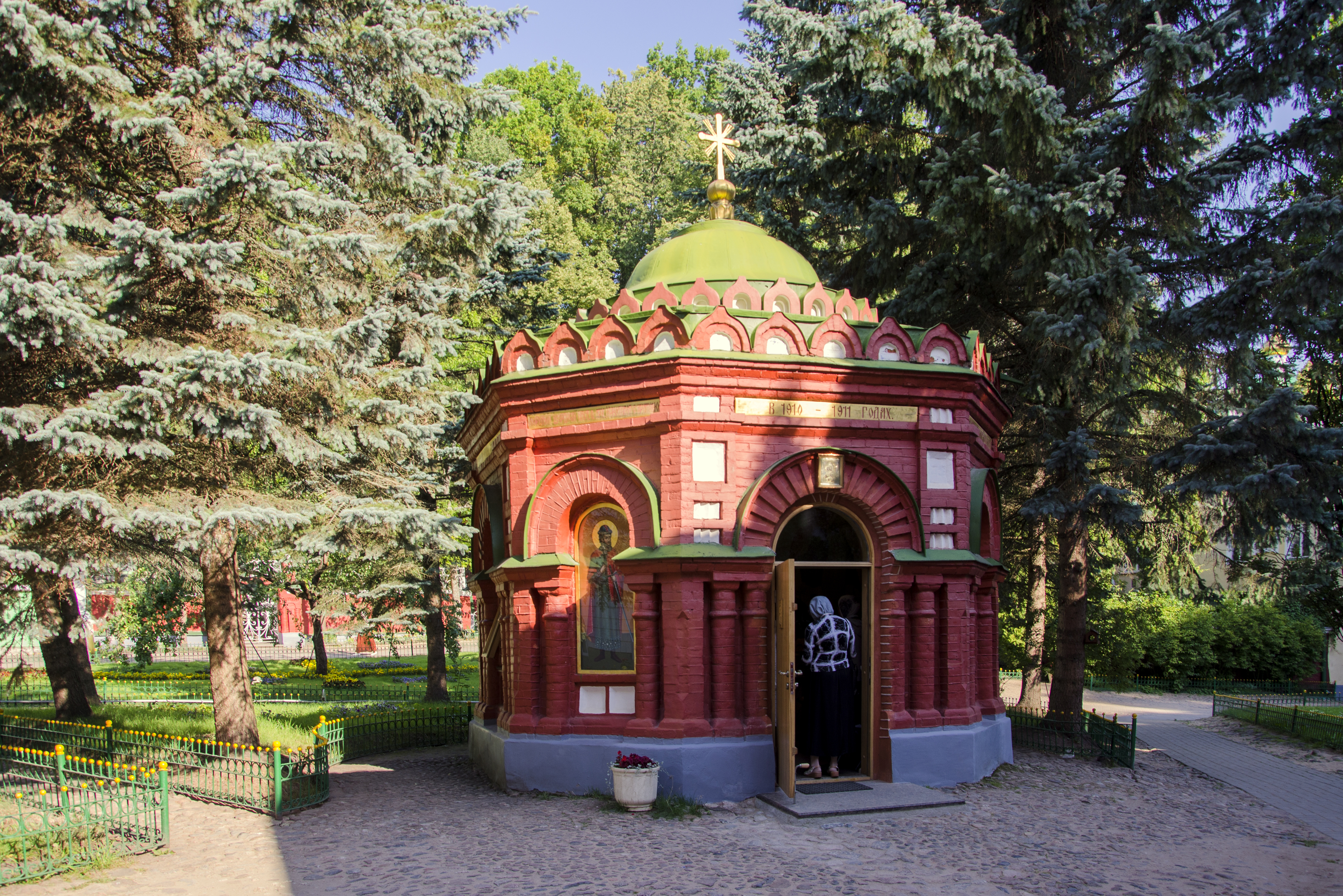 часовня преподобных Антония и Феодосия: Печоры, Печорский район, Псковская область